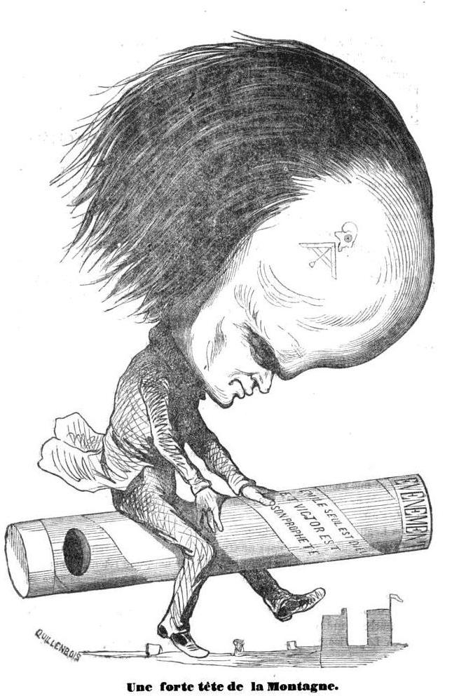 "Une forte tête de la Montagne". [Victor Hugo]